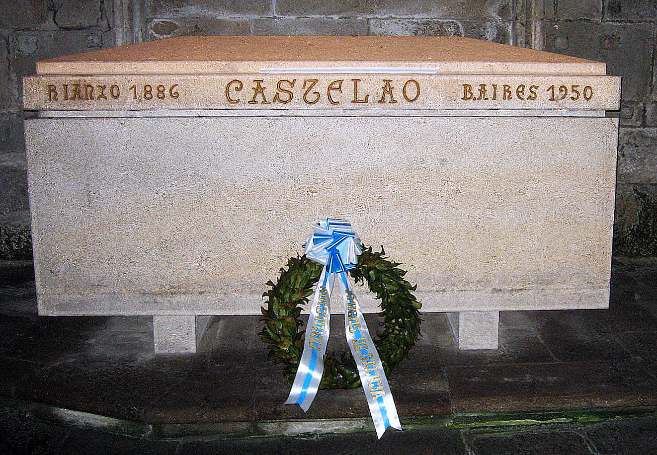 Sartego de Castelao. Santiago de Compostela, Panteón de Galegos Ilustres, no Convento de San Domingos de Bonaval